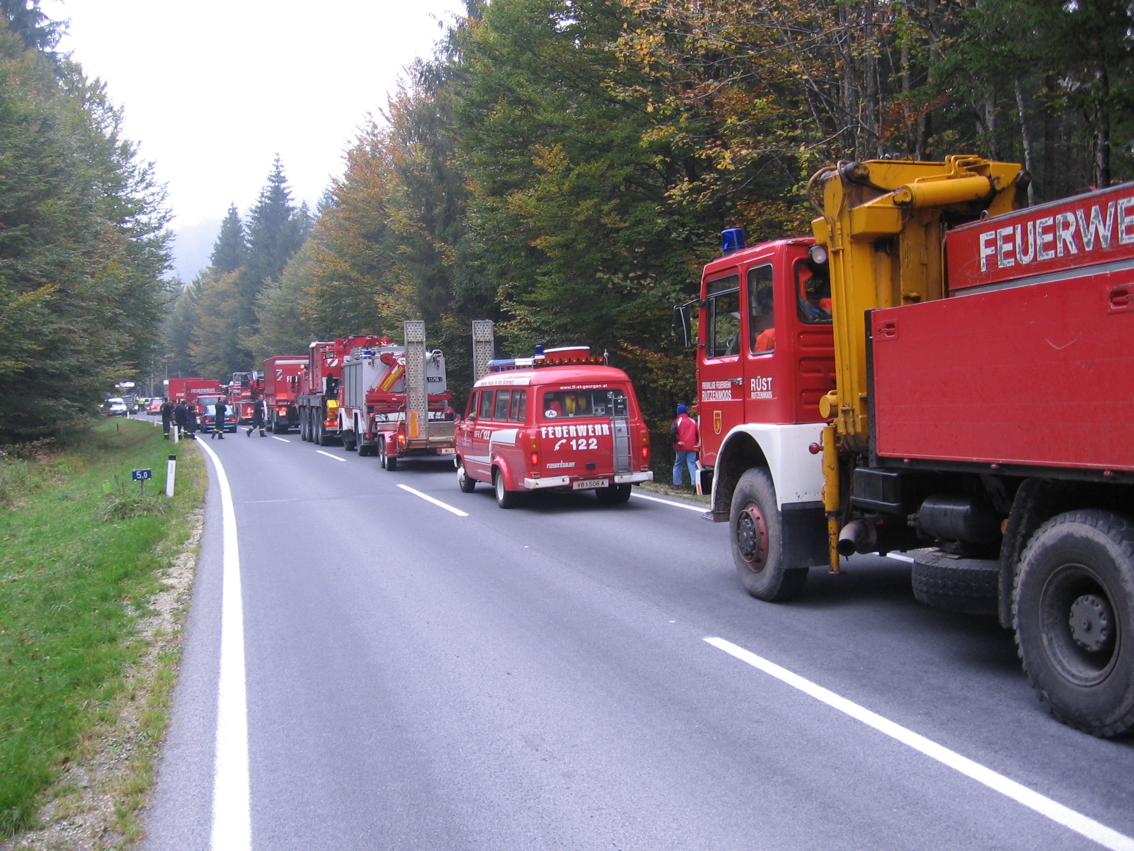 Einige Fahrzeuge des IV. Zug (Technischer Zug) der 13 Feuerlösch und Bergeeinheit des Landes Oberösterreich. / Some Fire apparatus of Austria.